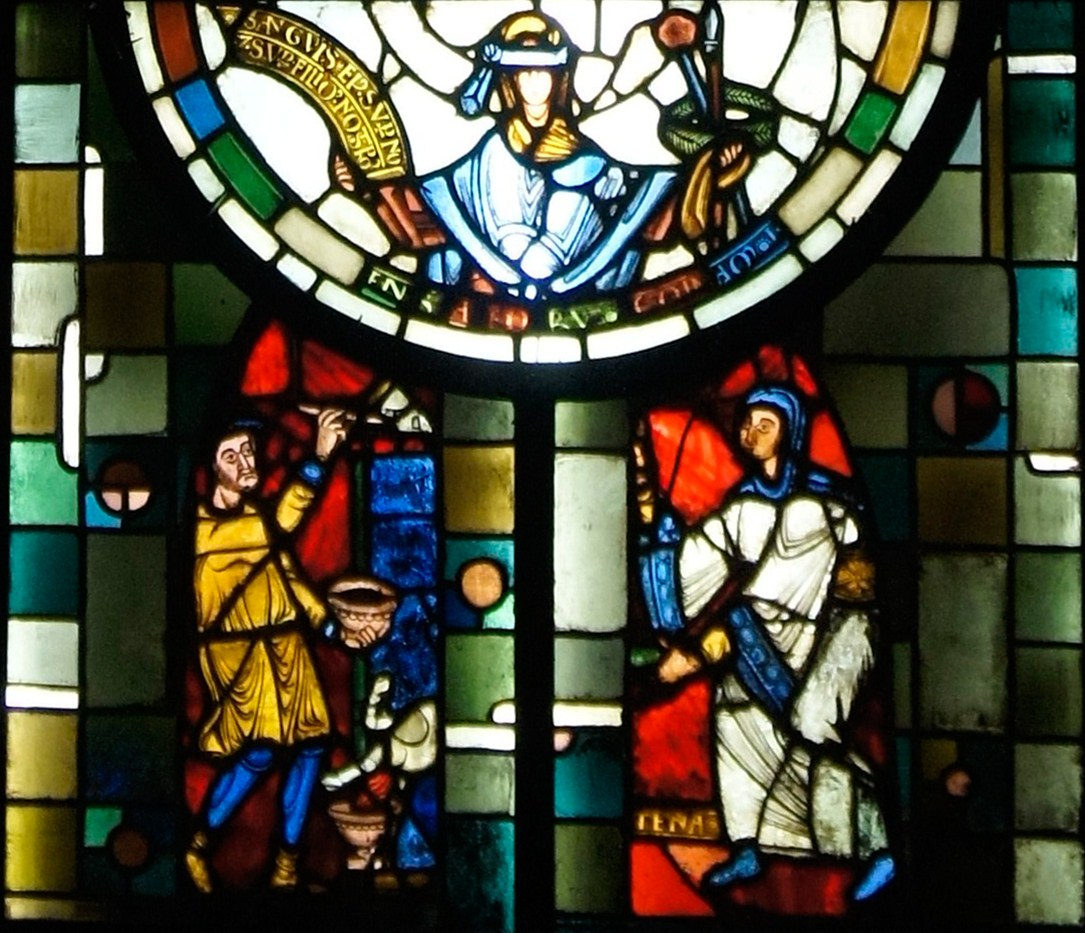 Vitrail de la Synagogue dans le vitrail de la rédemption en la Cathédrale Saint-Étienne de Châlons.